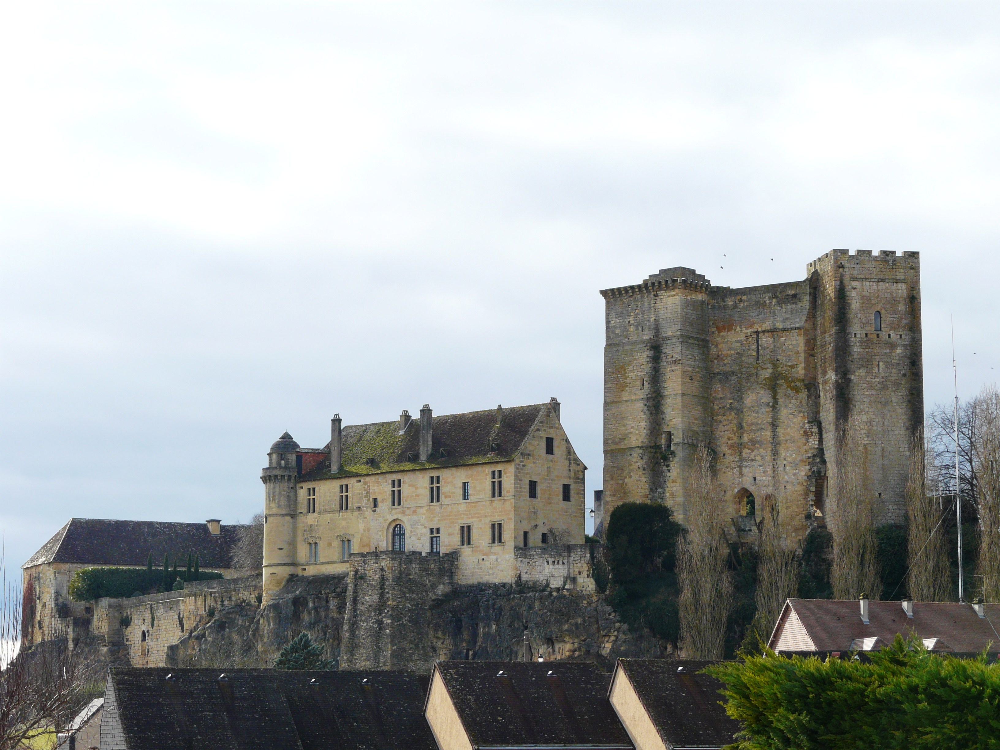 Le logis et le donjon du château d'Excideuil vus du nord-est, Dordogne, France